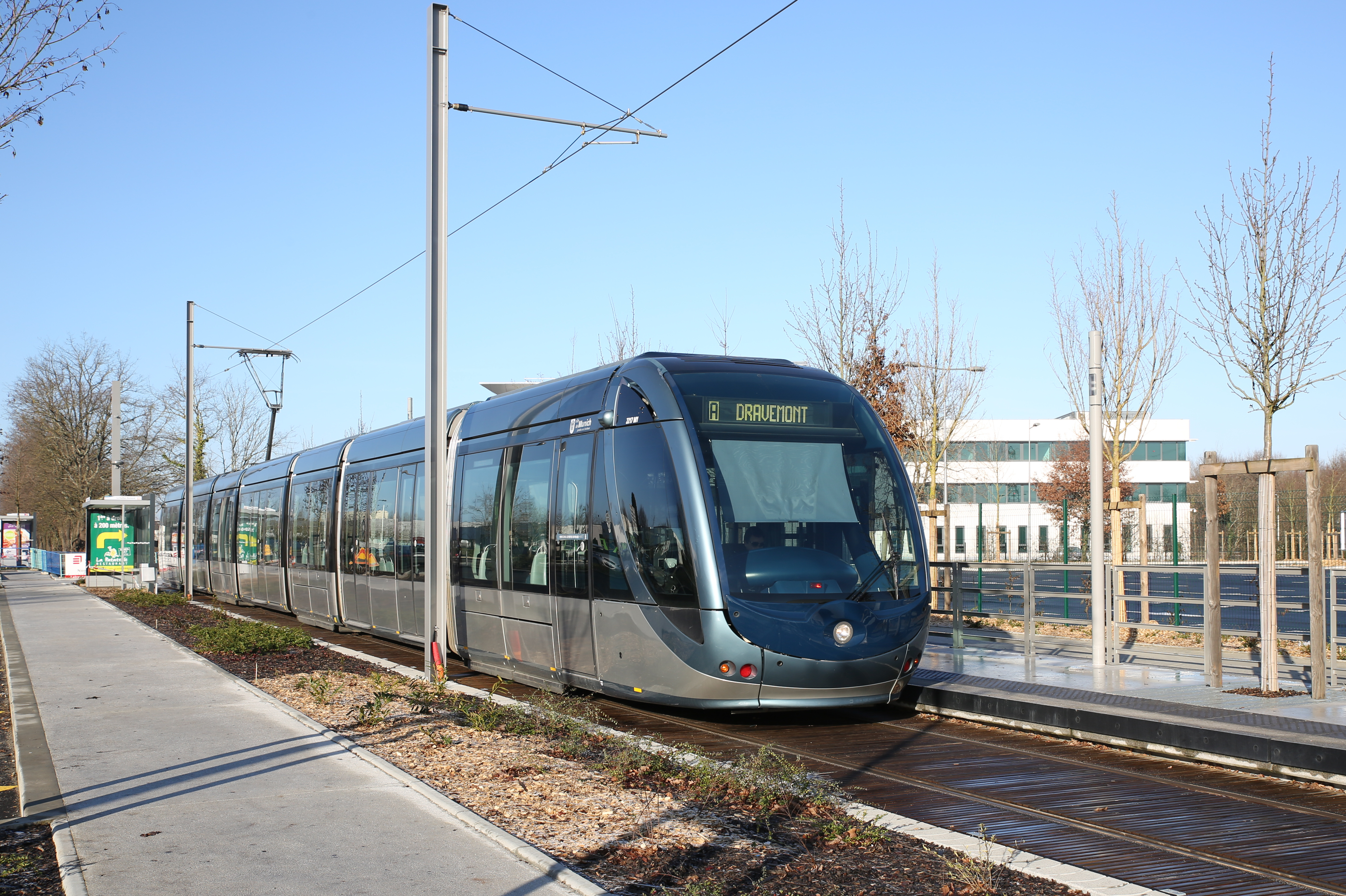 Station Le Haillan Rostand et son parking vide en ce dimanche matin. Nouveau terminus Ouest de la ligne A, mis en service la veille.